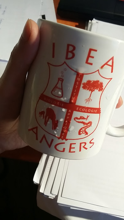 un souvenir a l'Institut de biologie et d'écologie appliquée